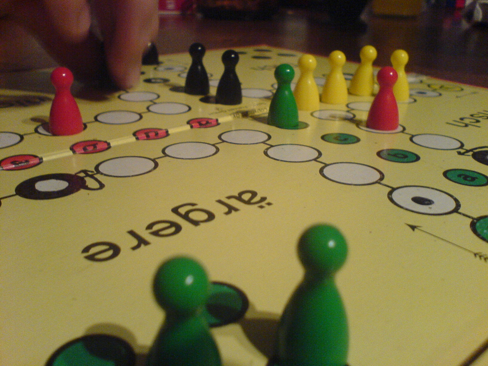 Mensch Ärgere Dich Nicht board game